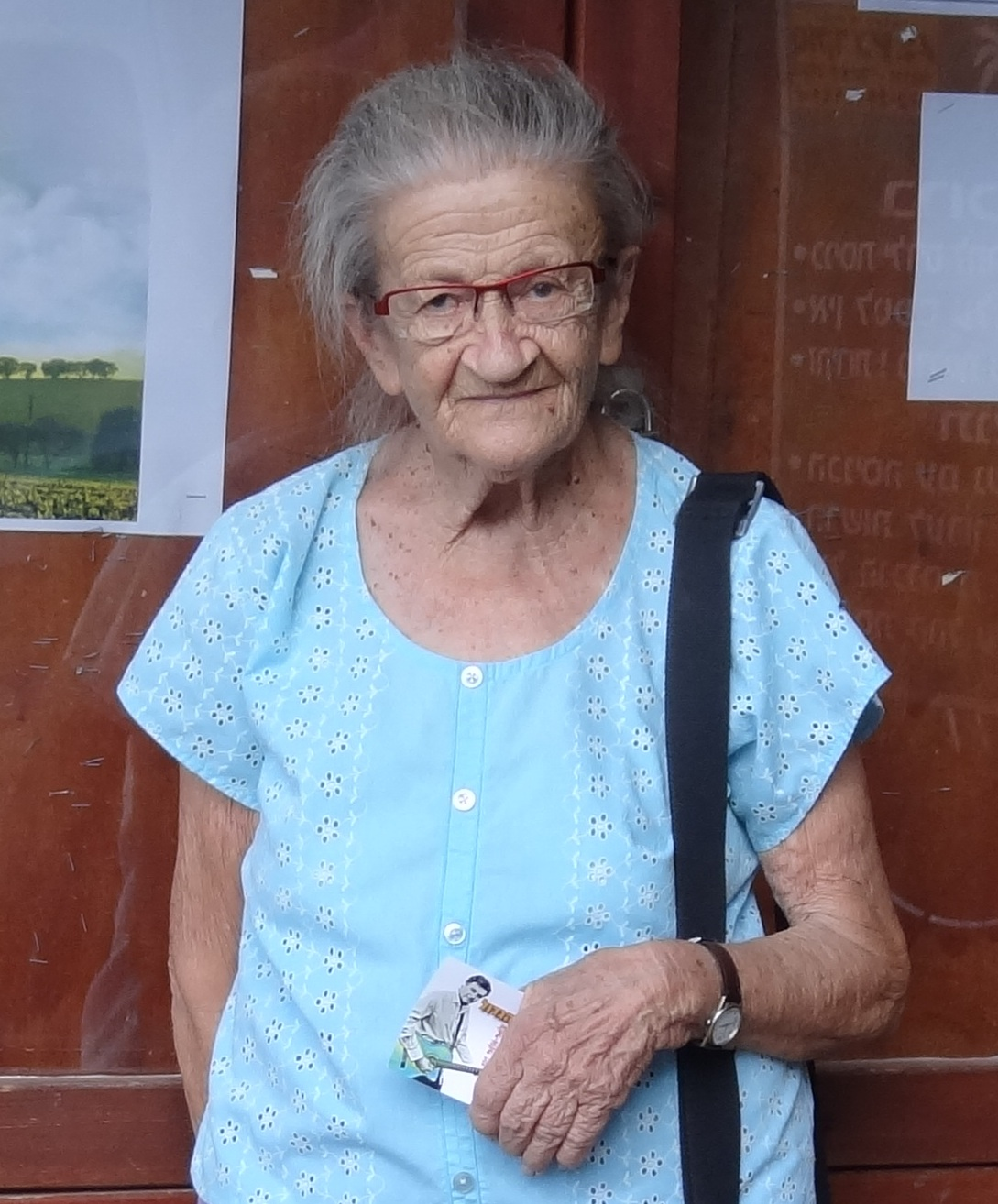 Naomi Polani in front of "Tsel Tamar" restaurant in Jordan Valley near Ashdot Ya'akov Ihud, Israel נעמי פולני בכניסה למסעדת "צל תמר" בכניסה לקיבוץ אשדות יעקב איחוד. נעמי פולני (נולדה באב תרפ"ז 1927), זמרת, במאית ומעבדת ישראלית, מזוהה בעיקר עם ראשית דרכן של הלהקות הצבאיות ועם להקת "התרנגולים" אותה הקימה.